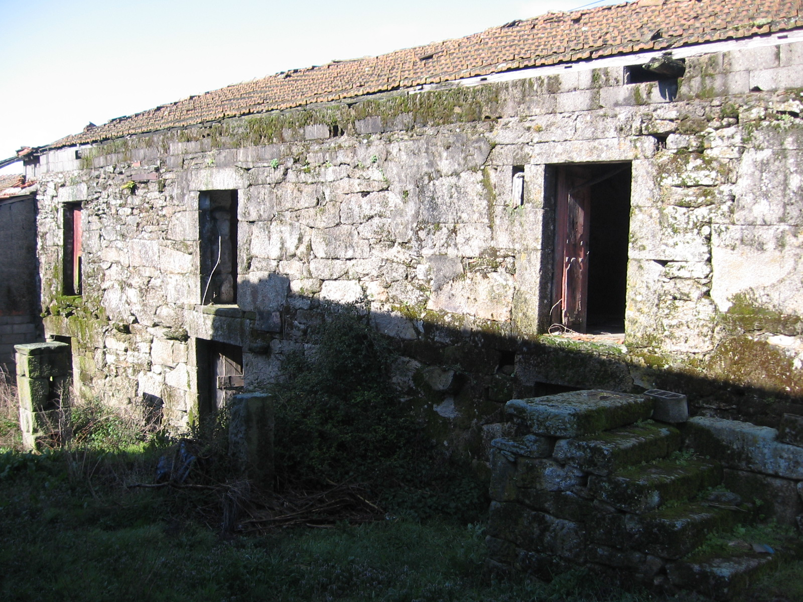 Casa construída sobre a fronteira anterior a 1864. A porta da direita estaria em antigo território espanhol, Soutelinho da Raia, Chaves, Portugal.